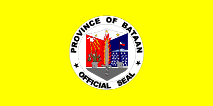 Dit materiaal is afkomstig van of en is door de auteur Jaume Ollé als GFDL beschikbaar gesteld, zie de toestemmingsemail. Hiermee vervallen de strictere voorwaarden in de disclaimers op de genoemde sites.Vrijgegeven bijdrage op Flags of the World van Jaume Olle. Zie deze verklaring op de Spaanstalige Wikipedia. GNU FDL